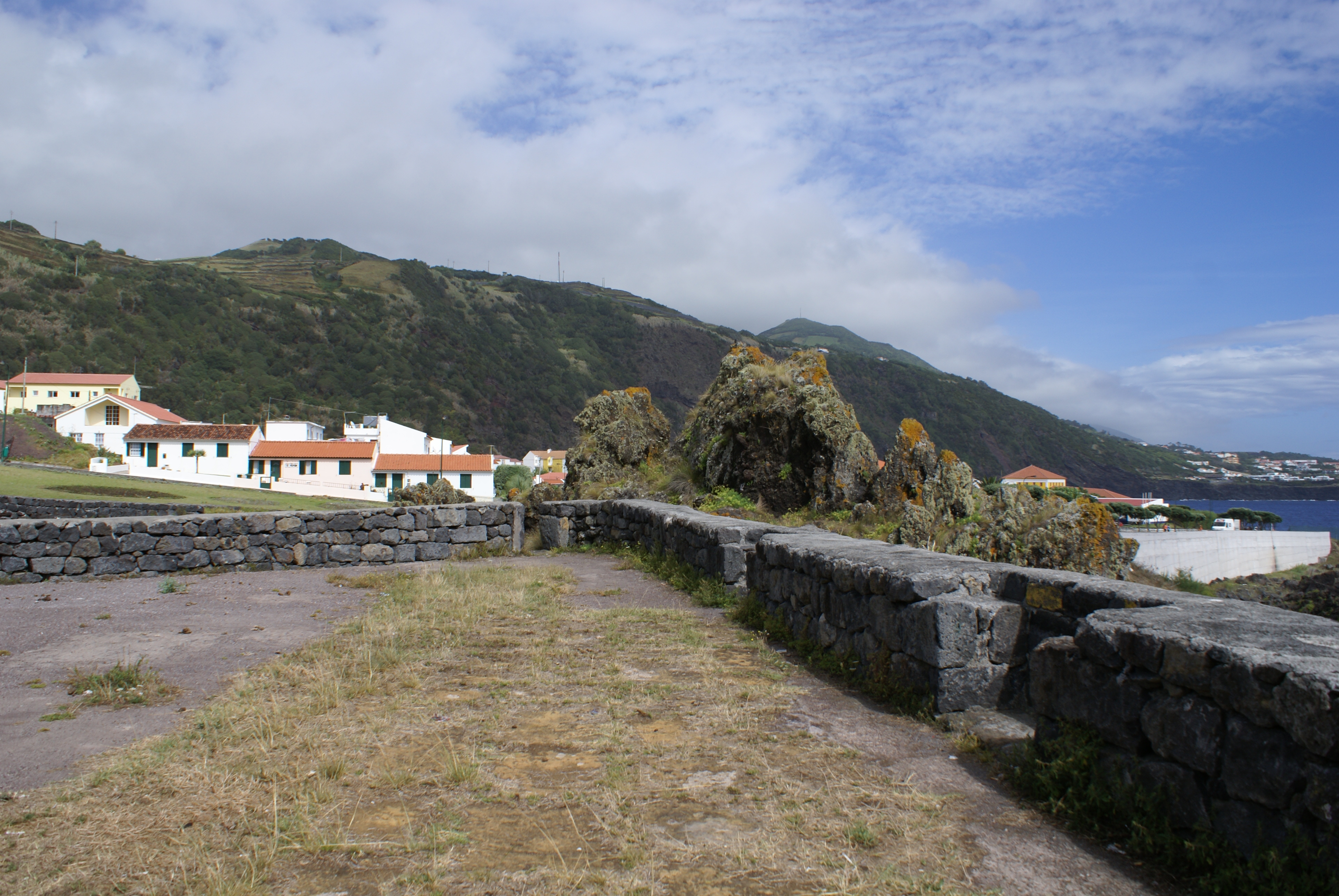 Forte da Preguiça, Velas, ilha de São Jorge, Açores